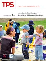 TPS